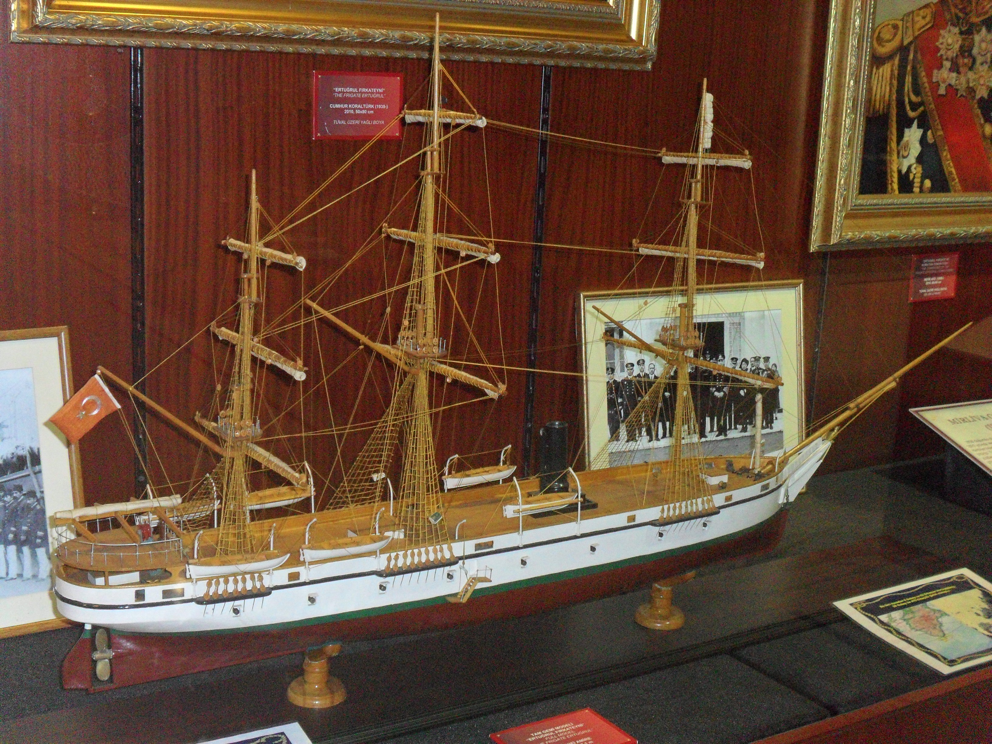 Mersin Deniz Müzesinde sergilenmekte olan Ertuğrul fırkateyni tam modeli.